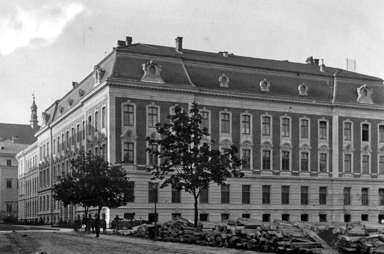 Будівля колишньої промислової школи у Львові. Архітектор Густав Бізанц (1848-1925).